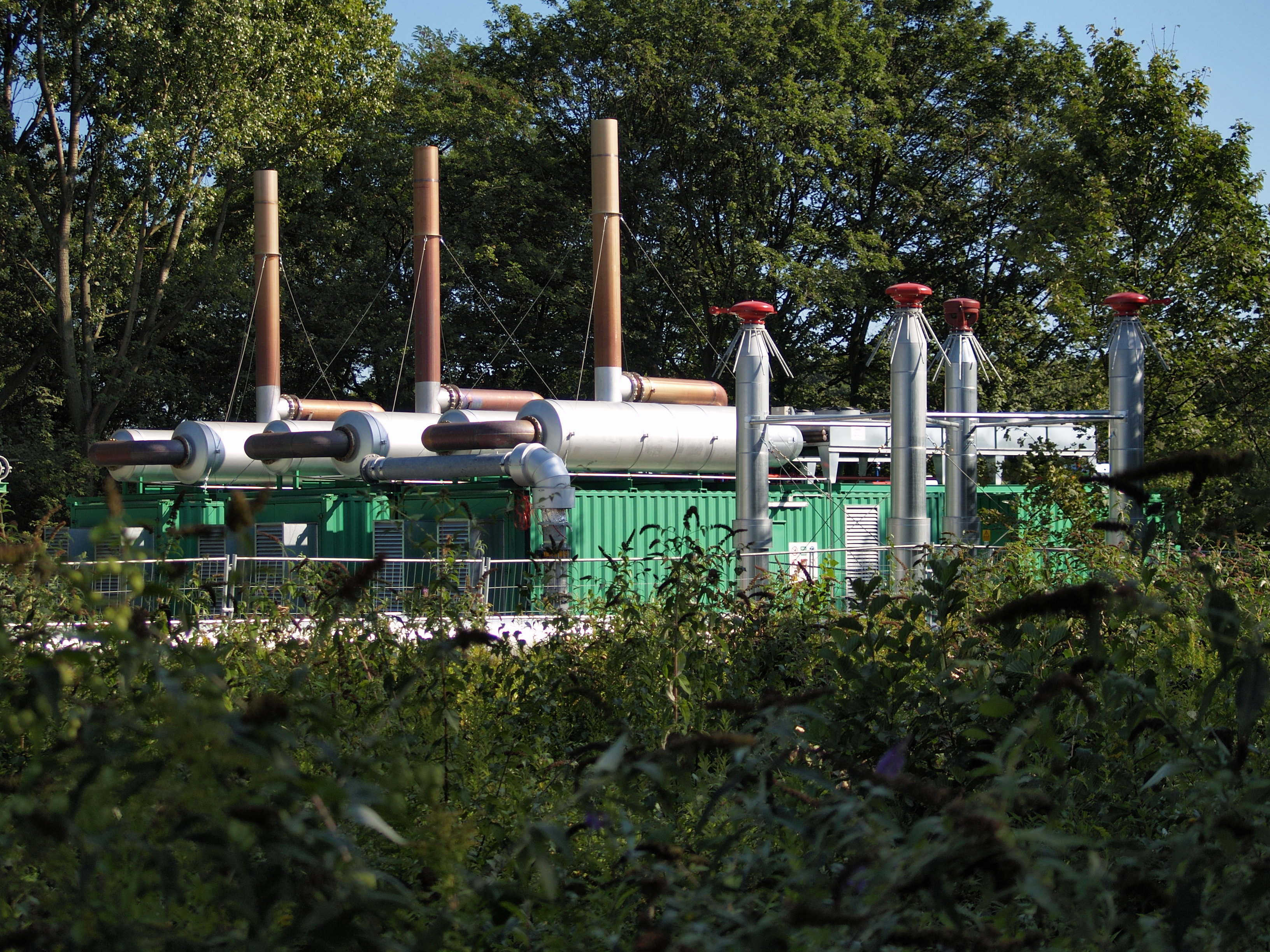 Grubengas-Absauganlage am früheren Schacht 3 der ehemaligen Zeche Unser Fritz in Herne (Wanne), Südseite.